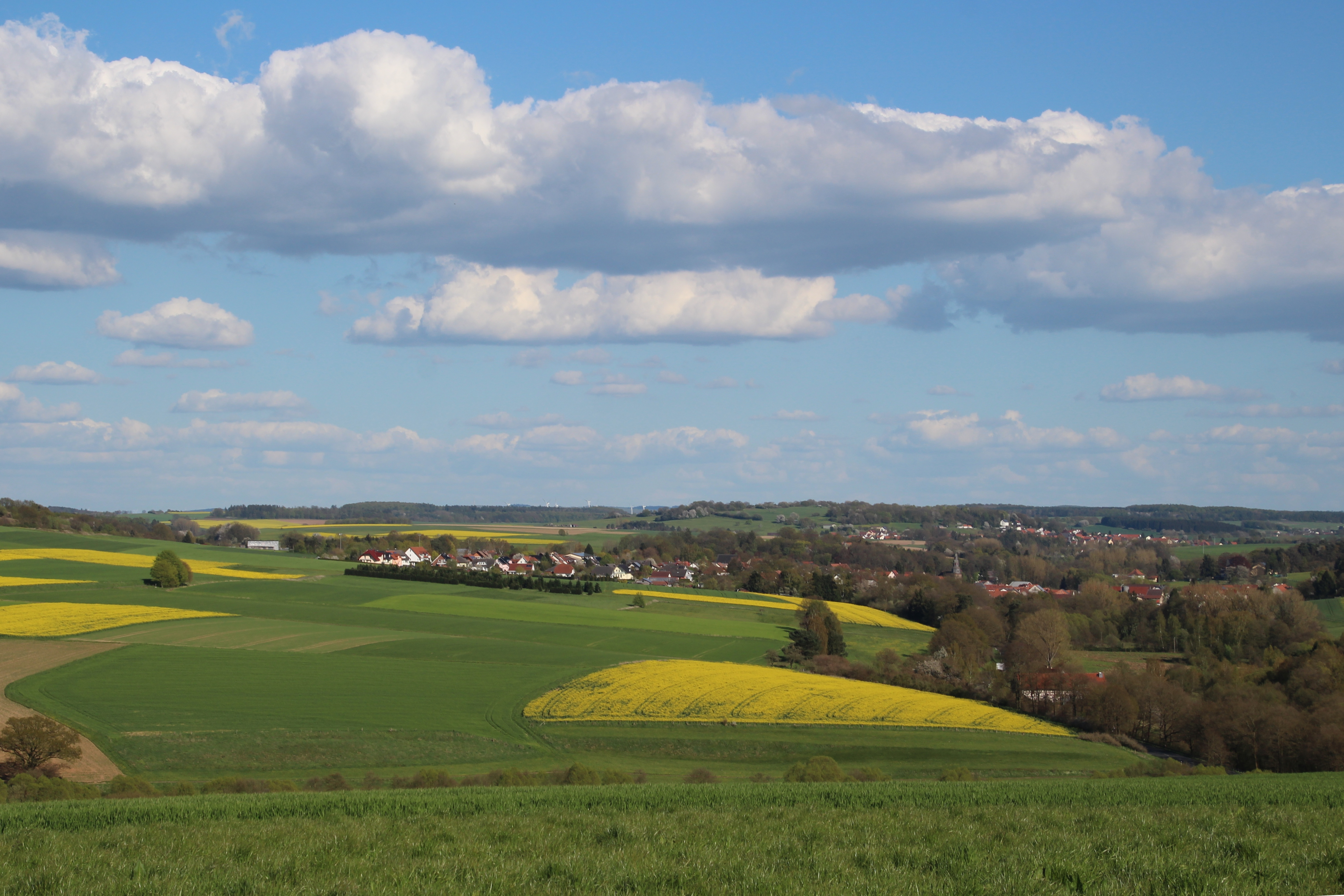 Kirtorf